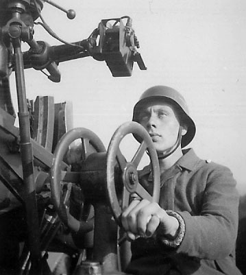 Lëtzebuerger Luftwaffenhelfer beim Riichten vun der 3,7-Flak